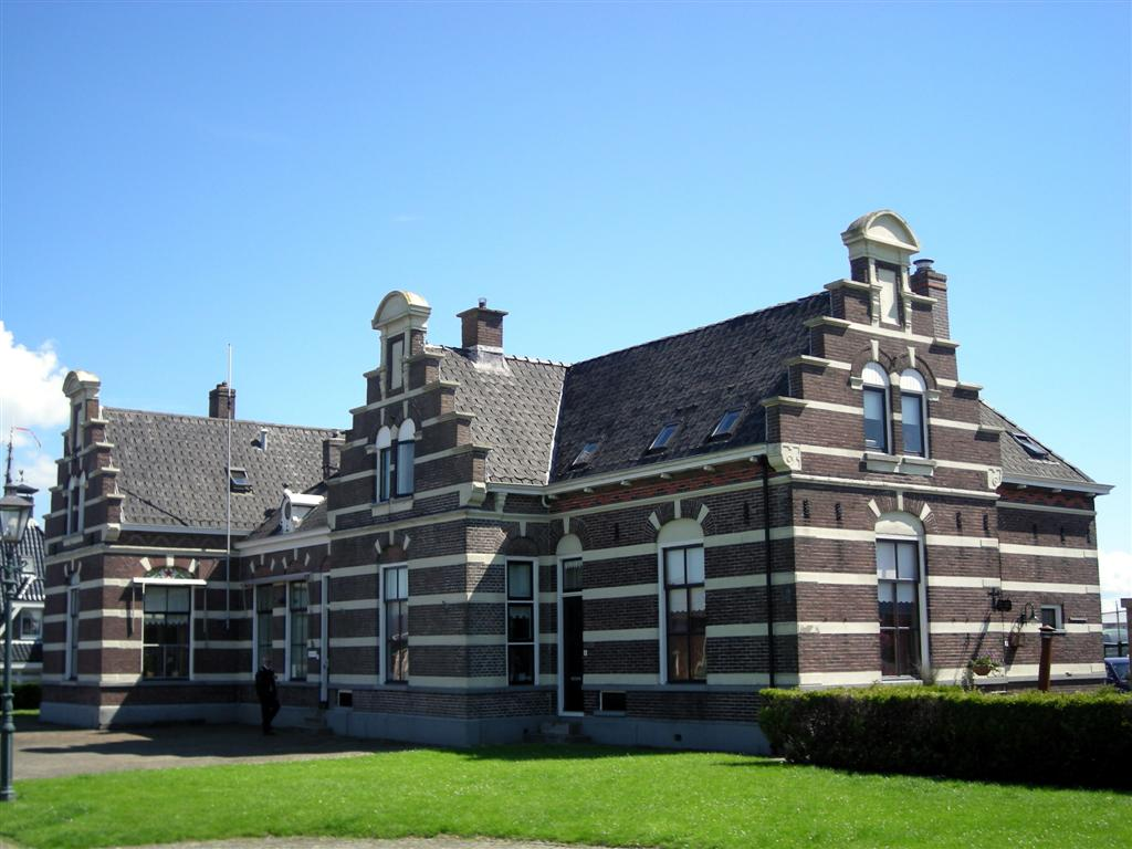 Woningen bij Lemstersluis